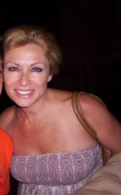 Leticia Calderon en Dolores, Gto con admirador.